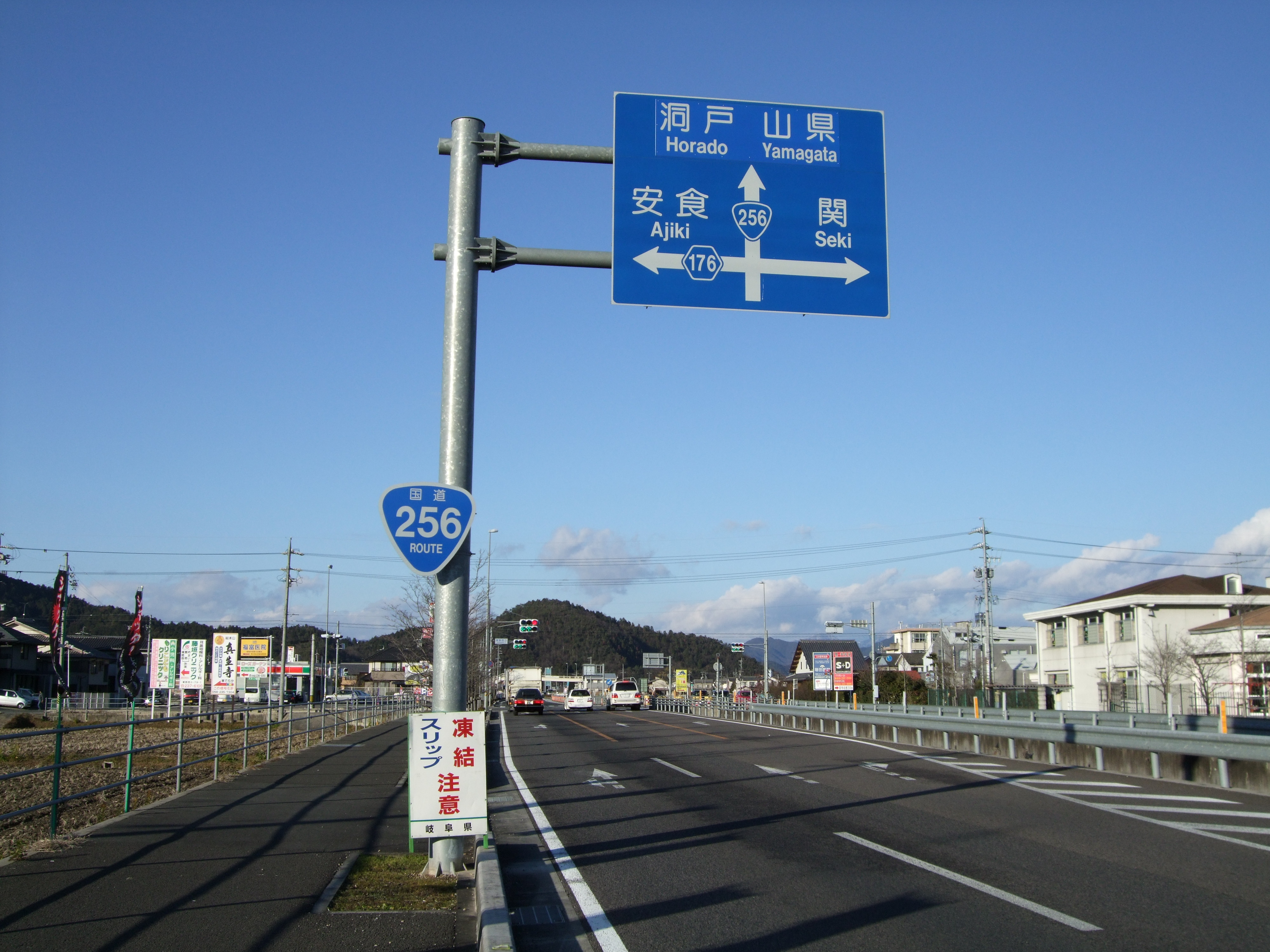 Saga-awano-bypass on R256 in Gifu, Japan